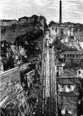 Funikularo